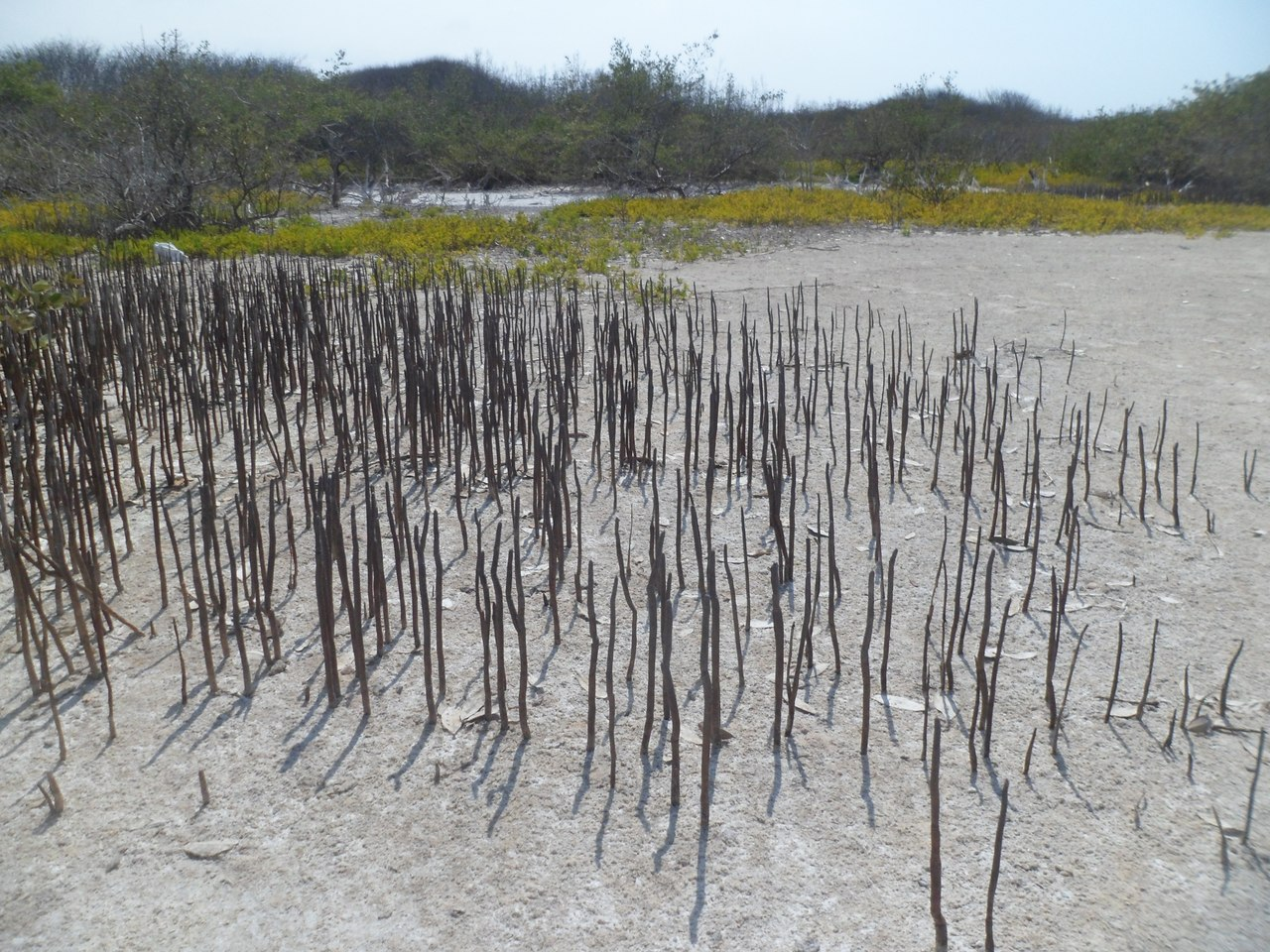 ISLA LARGA PARTE POSTERIOR 1 ES UNA ZONA POCO EXPLORADA LA FLORA ES MUY HERMOSA.